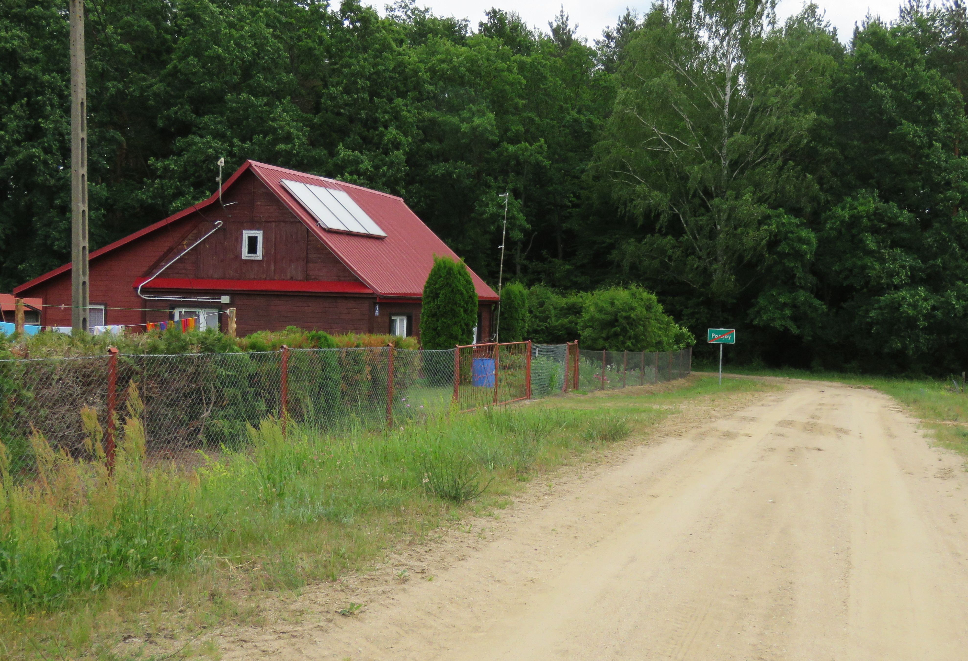 Poręby